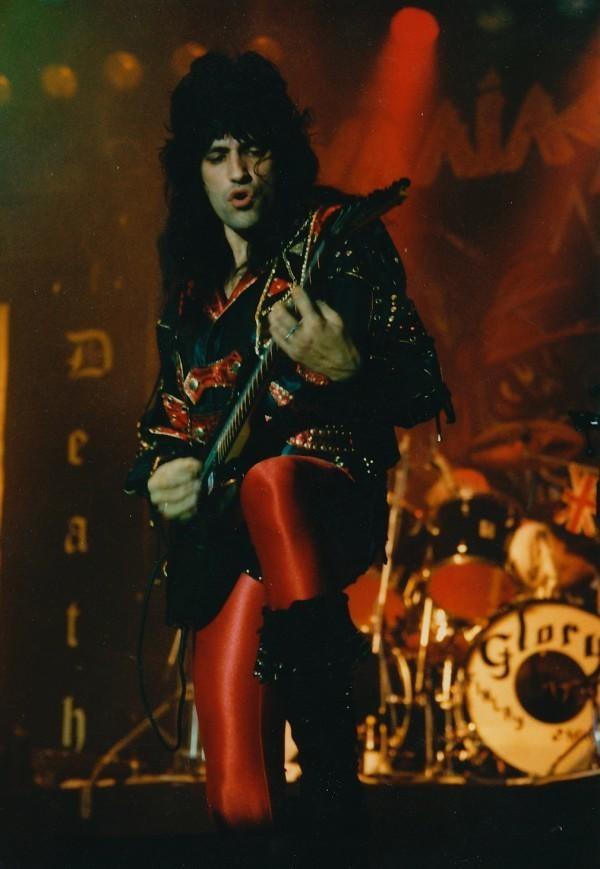 Бывший гитарист Running Wild